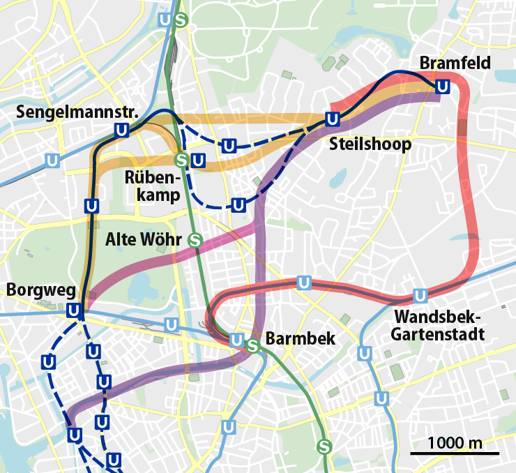 Planungen der U-Bahn-Linie 5 in Hamburg: dunkelblau, dünne Linie: aktueller Planungsstand farbig transparent, dicke Linien: untersuchte Trassenkorridore in der Konzeptstudie von 2014 im Bereich Bramfeld–U3-Nordring This map may be incomplete, and may contain errors. Don't rely solely on it for navigation.